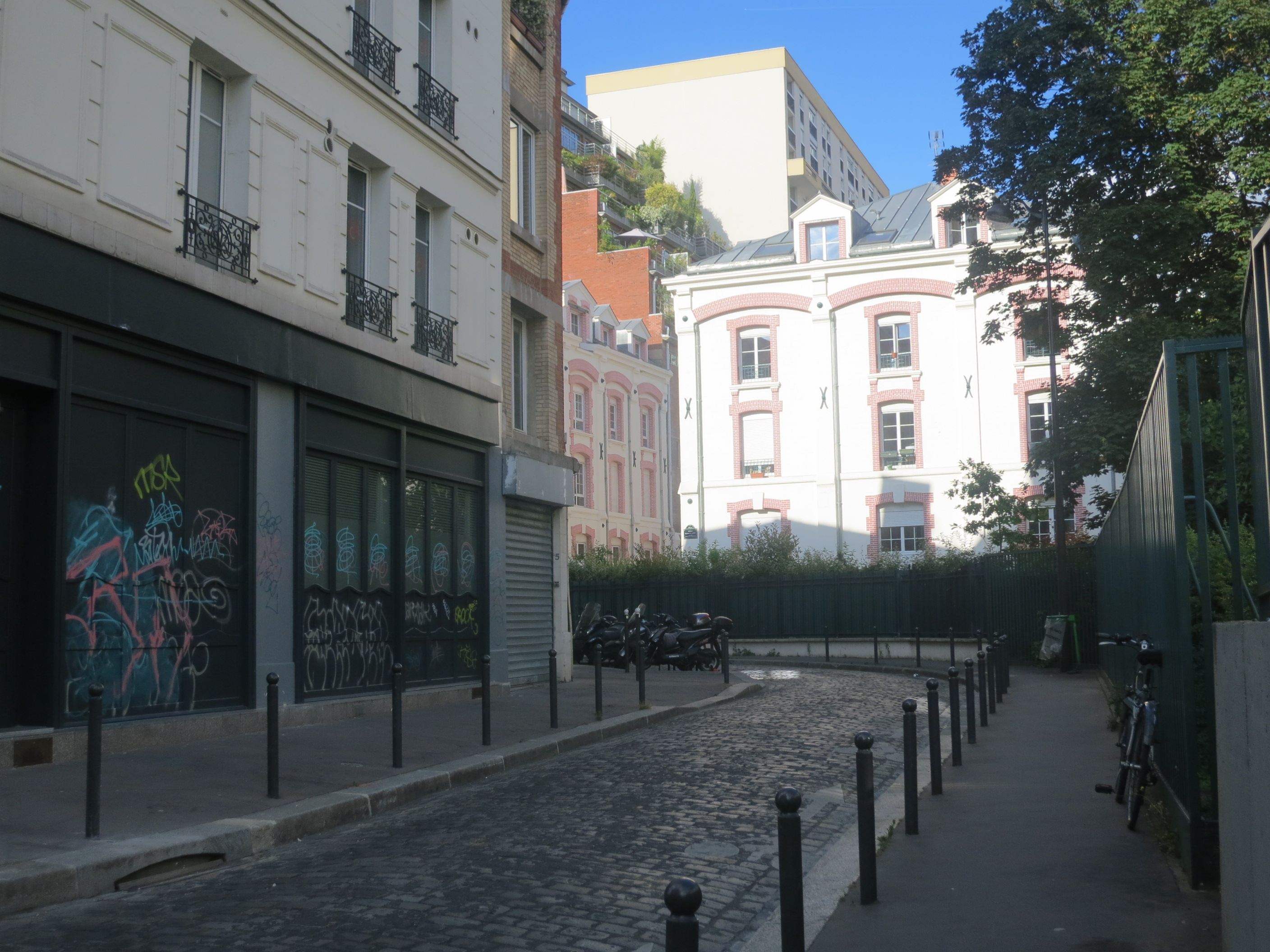 Vue du Passage de l'Atlas, Paris 19